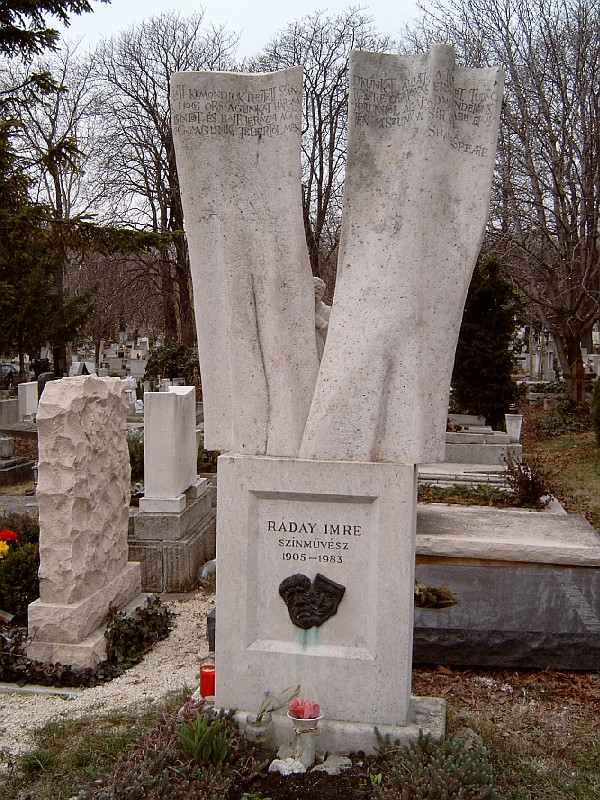 Ráday Imre (Budapest, 1905. szeptember 4. – Budapest, 1983. március 12.) magyar színművész, rendező sírja Budapesten. Farkasréti temető: 25-7-48 [szobrász: Kő Pál]